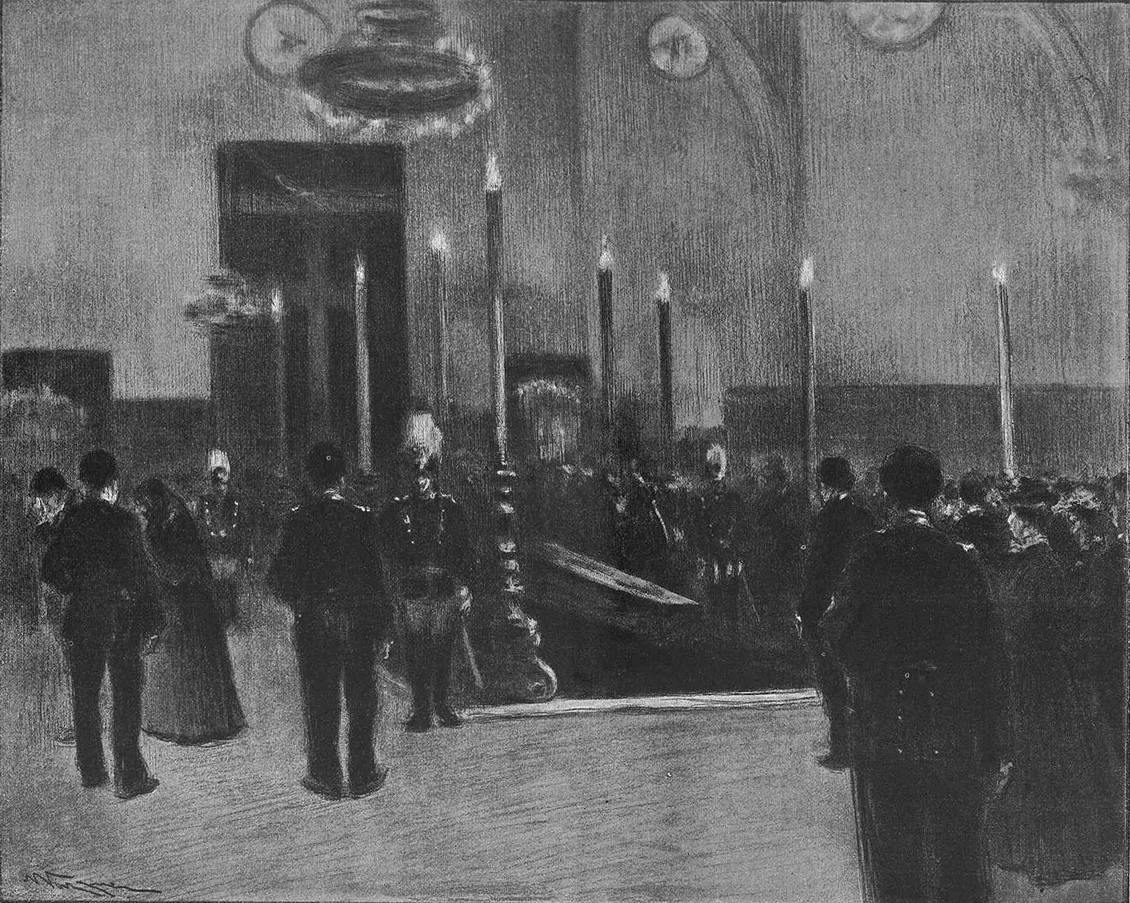 Barcelona. La capilla ardiente durante la exposición del cadáver de Mosén Jacinto Verdaguer, apunte del natural por Nicanor Vázquez.